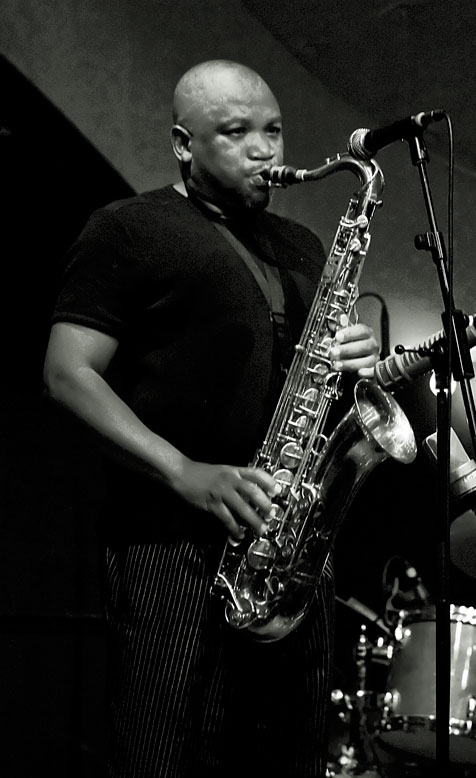 Zim Ngqawana